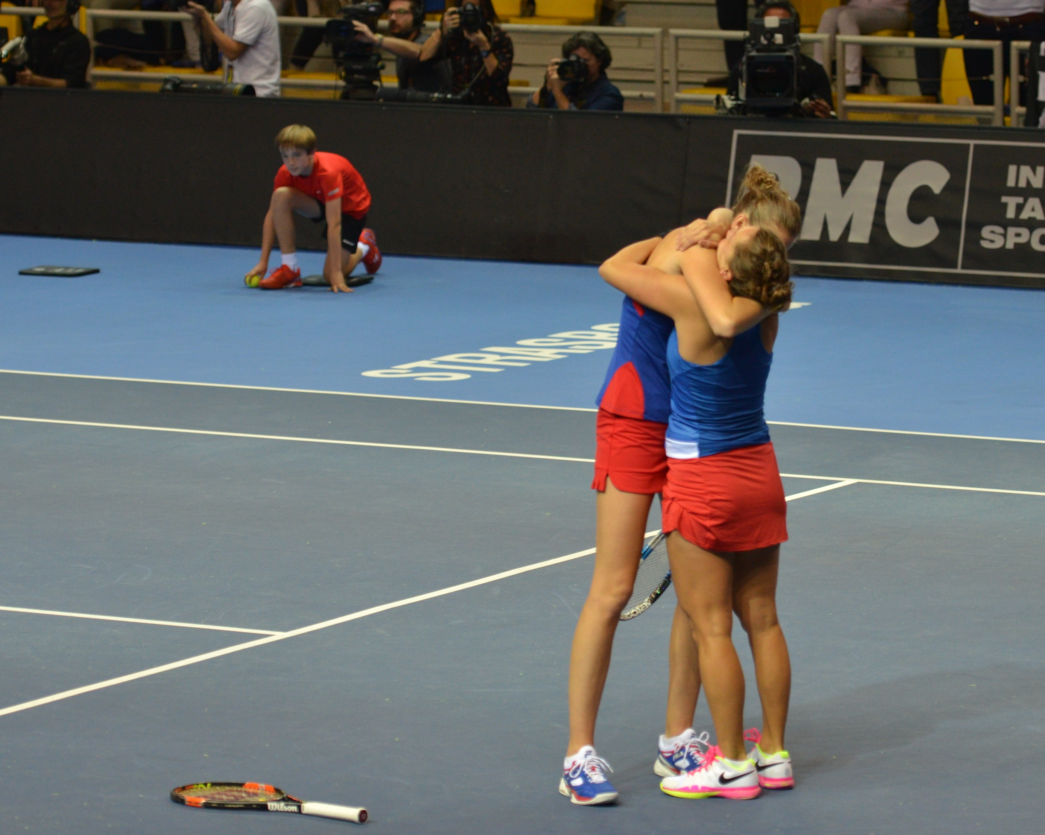 PPP_3412